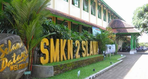 Logo SMK Negeri 2 Slawi